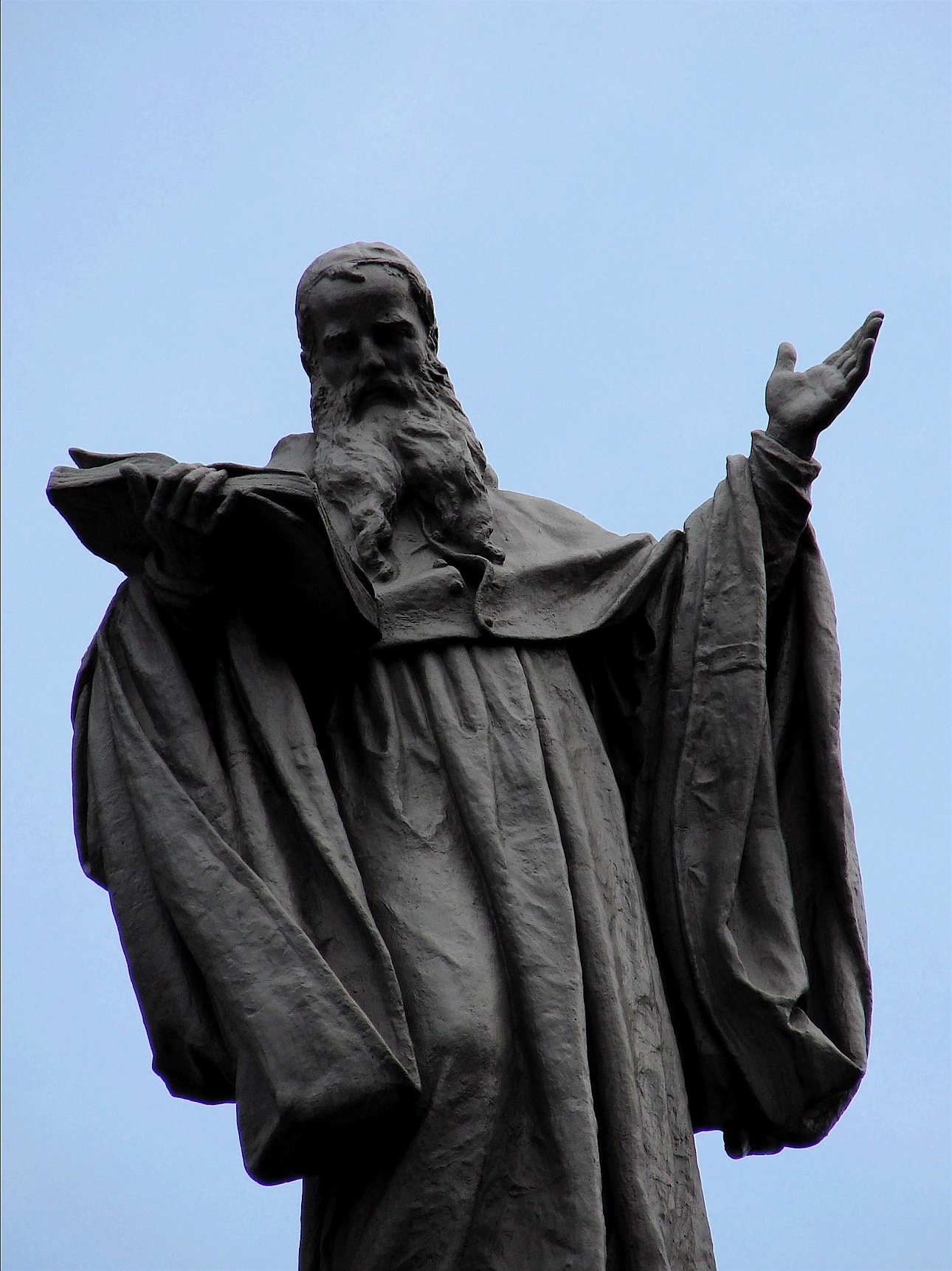 Benedikt af Nursia, Johannes Hoffmann, 1884, Frederikskirken, København